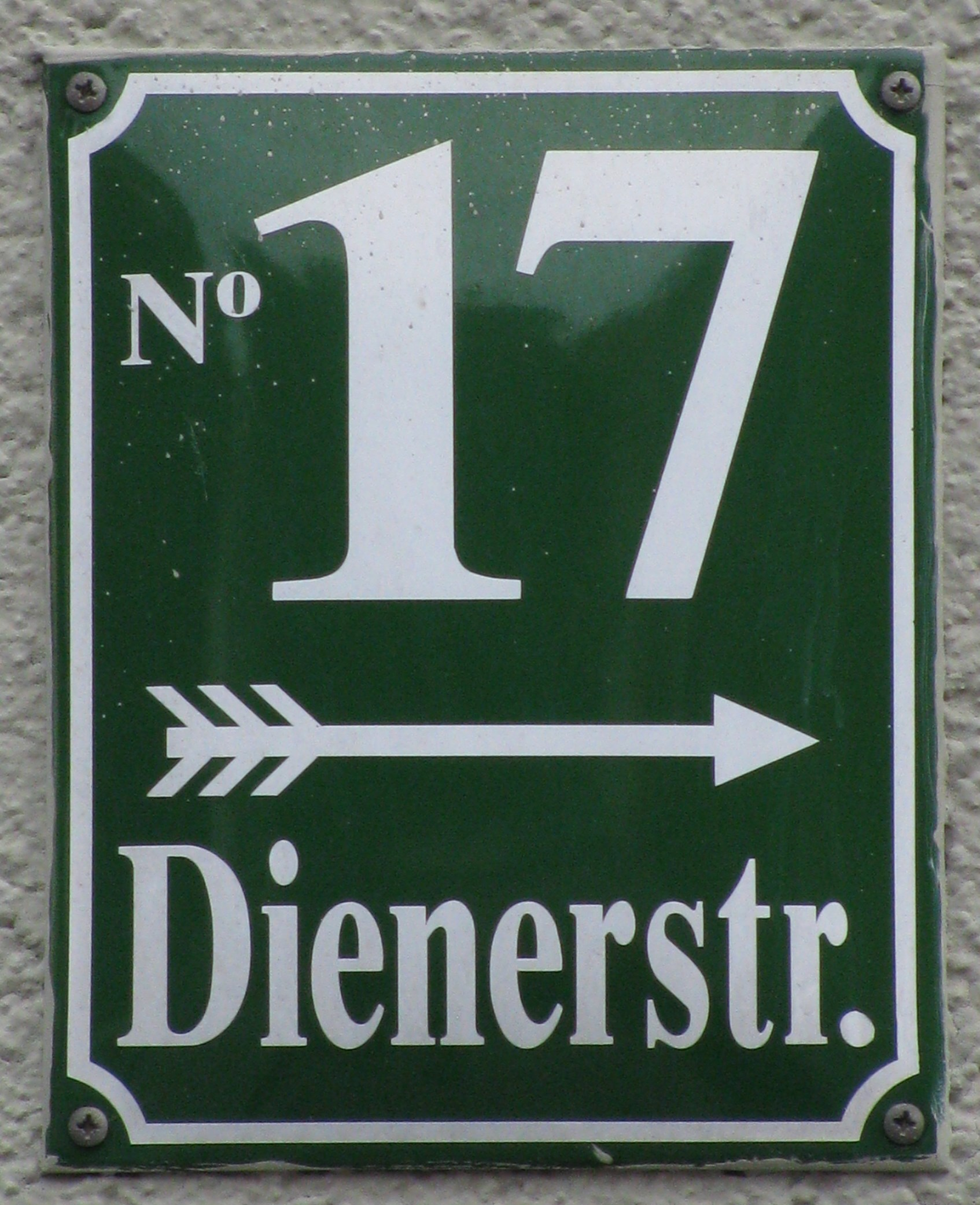 Deutschland - Bayern - München, Dienerstraße: Schild "Hausnummer 17"